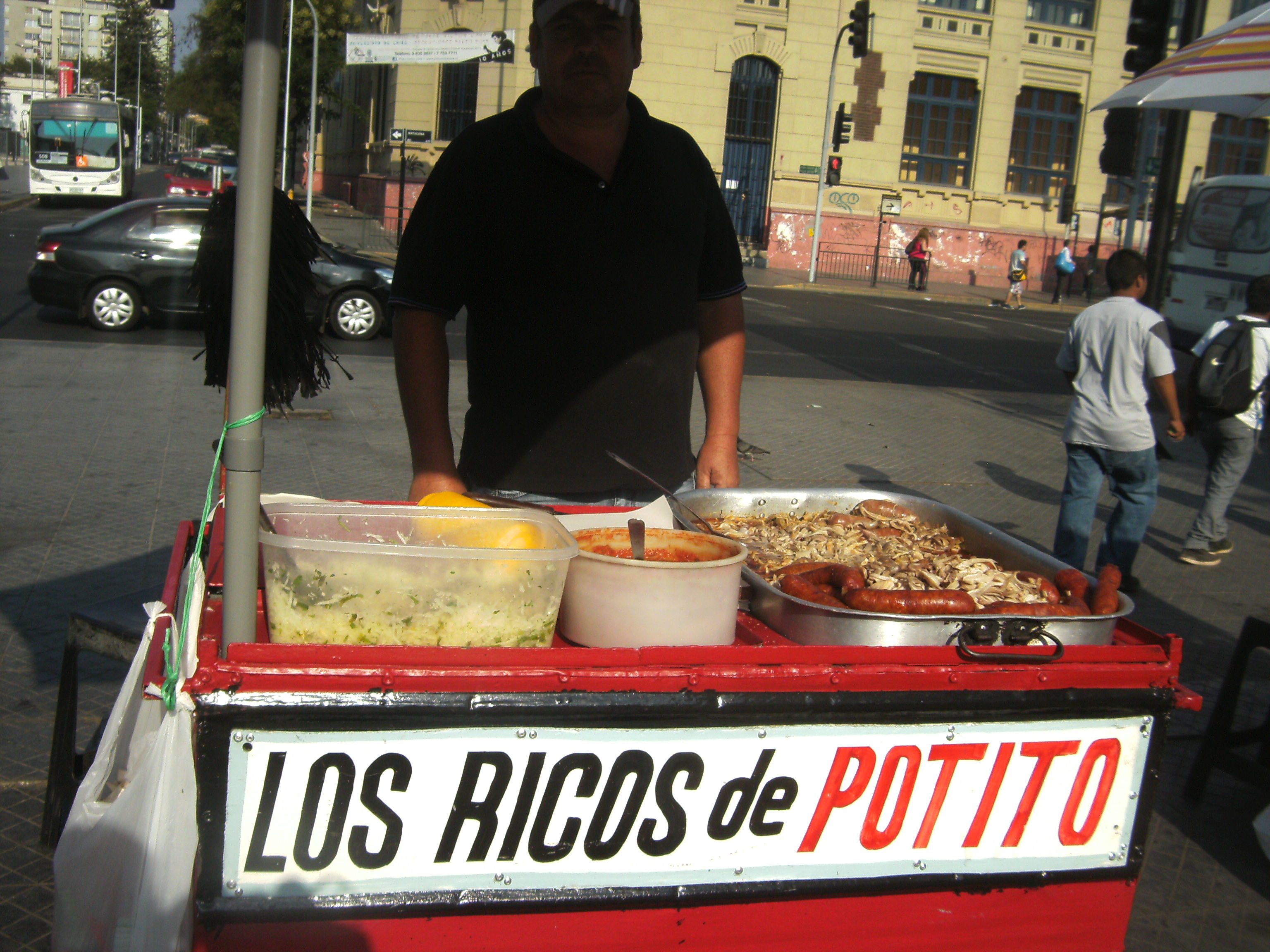 Puesto callejero de preparación de "Sandwich de Potito" en Santiago de Chile.